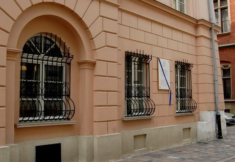 Budynek Collegium Philologicum wraz z tablicą upamiętniającą Karola Wojtyłę - studenta polonistyki UJ.